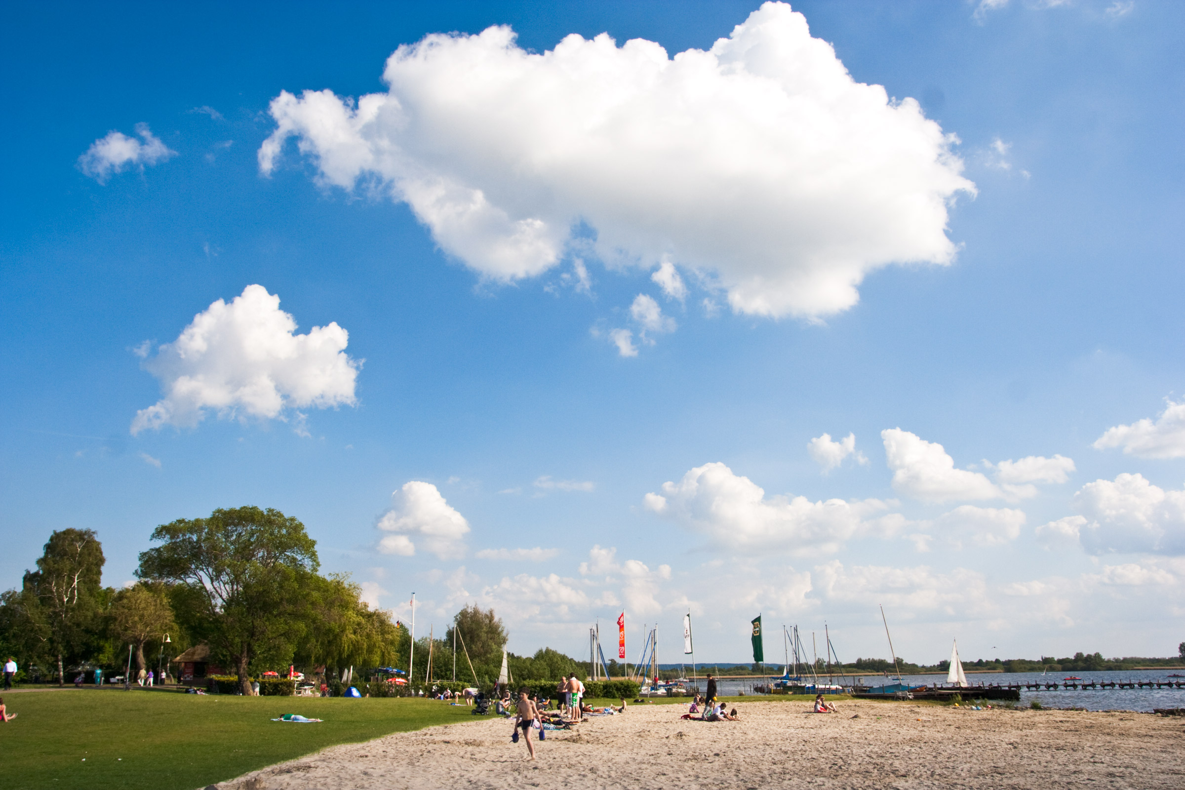 Aufgeschütteter Badestrand in Lembruch. Daneben der Hafen und die Bootsvermietung "Am Turm mit der Uhr".